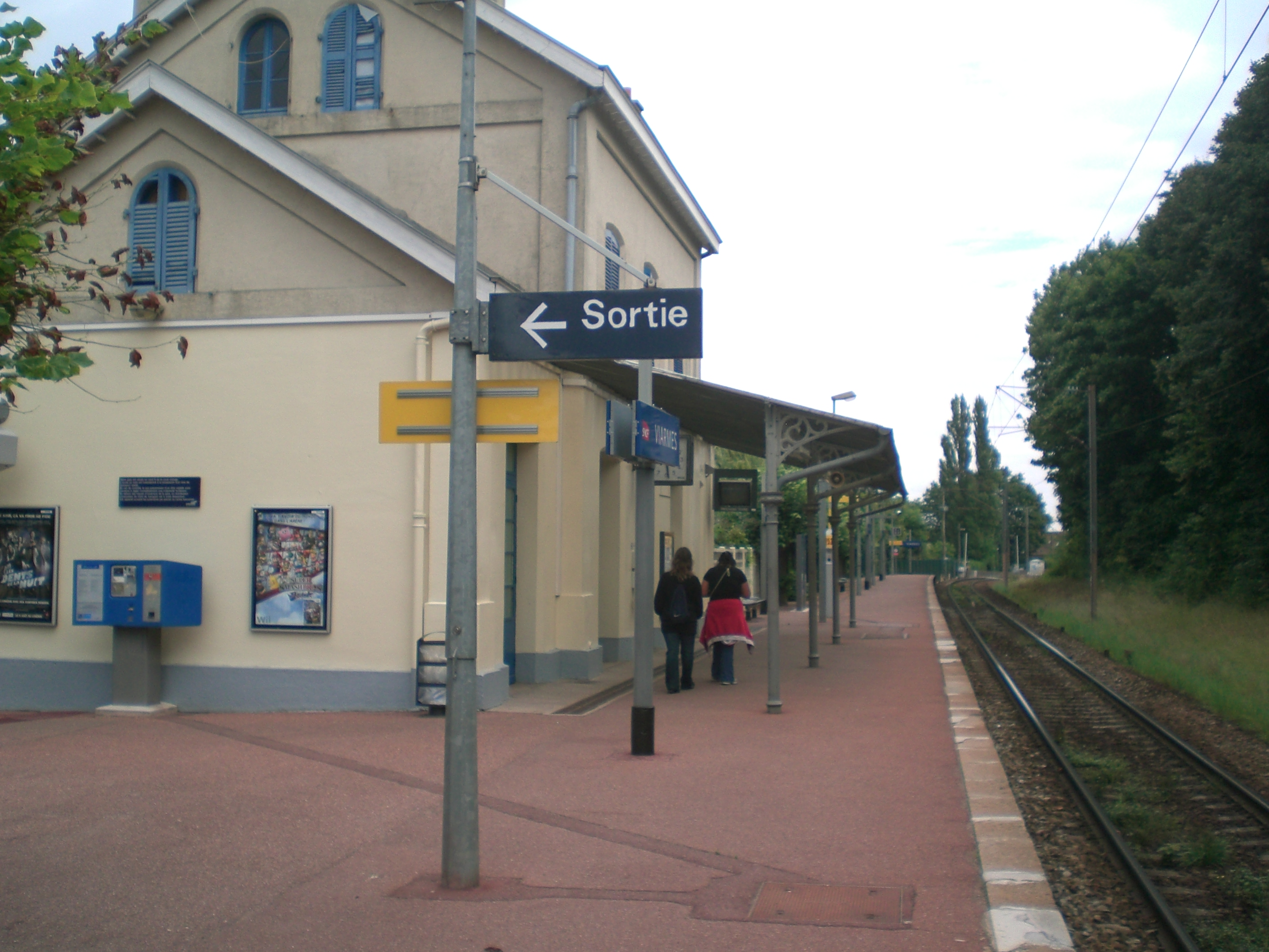 quai de la gare de viarmes